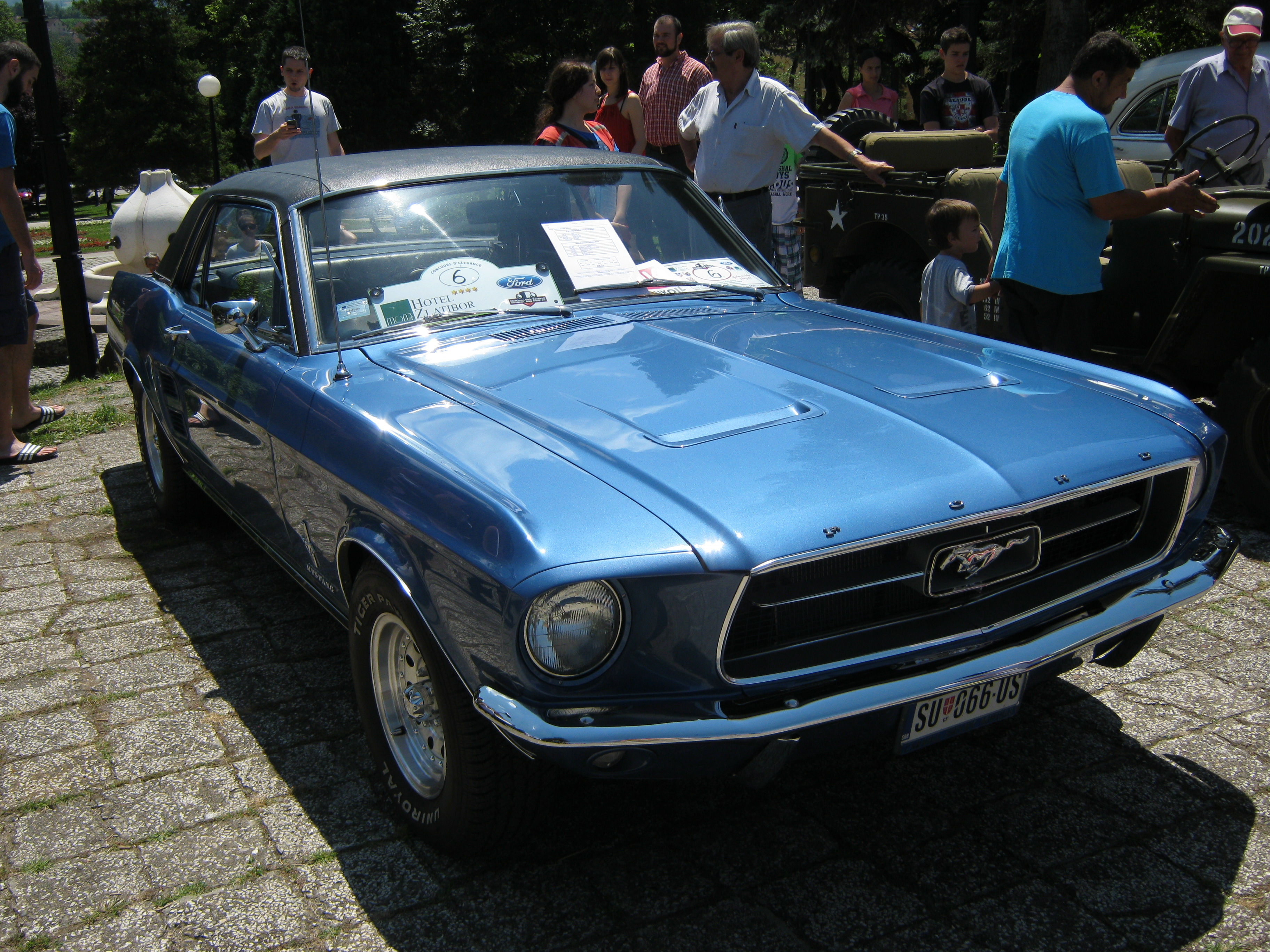 Ford Mustang iz 1965. godine.